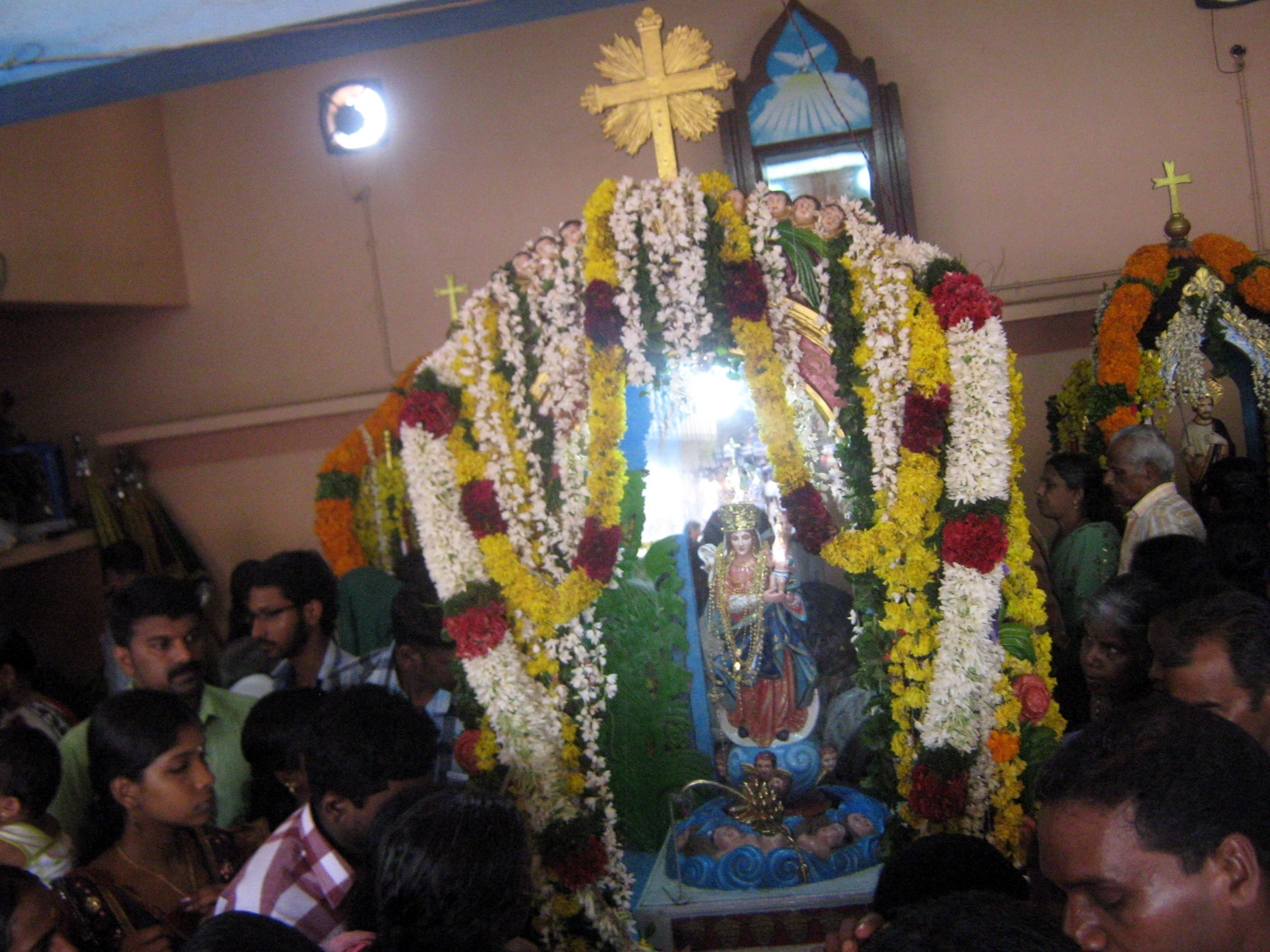 കൊരട്ടിമുത്തി തിരുനാള്‍ 2012